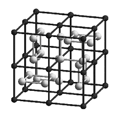 Skutterudite CoSb3 montrant deux cages vides. schéma réalisée par Utilisateur:David Berardan) Utilisateur:David Berardan